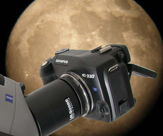 LM Digital Spektiv Adapter( von Micro-Tech-Lab ) für digitale Spiegelreflexkameras mit Carl Zeiss Diascope 65 T* FL / 85 T* FL mit Olympus E330